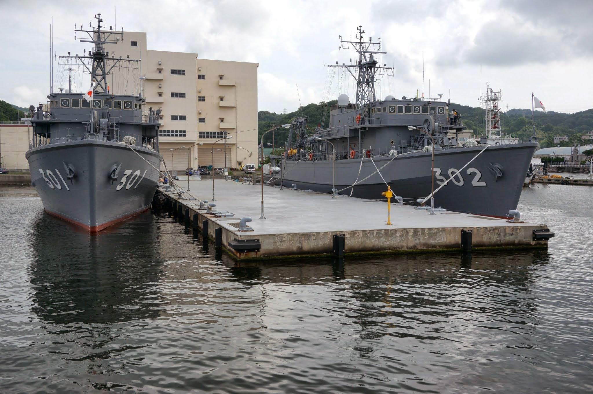 掃海艦やえやまと同つしま。横須賀・船越地区のNP-1桟橋に繋留中。